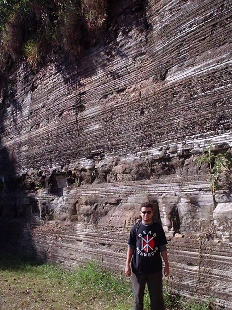 Perfil de depósito de varvito